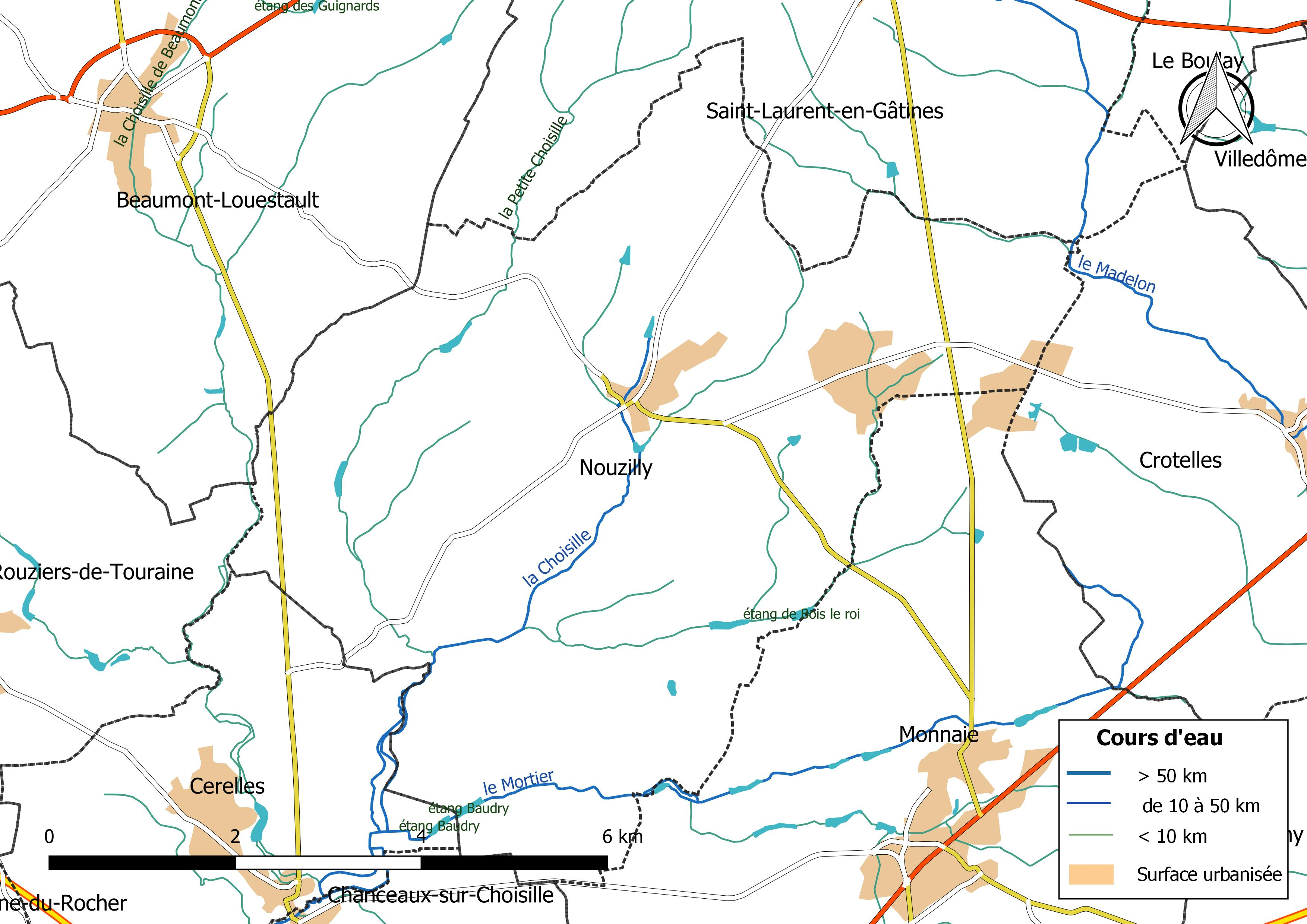 Carte du réseau hydrographique de la commune de Nouzilly (France).